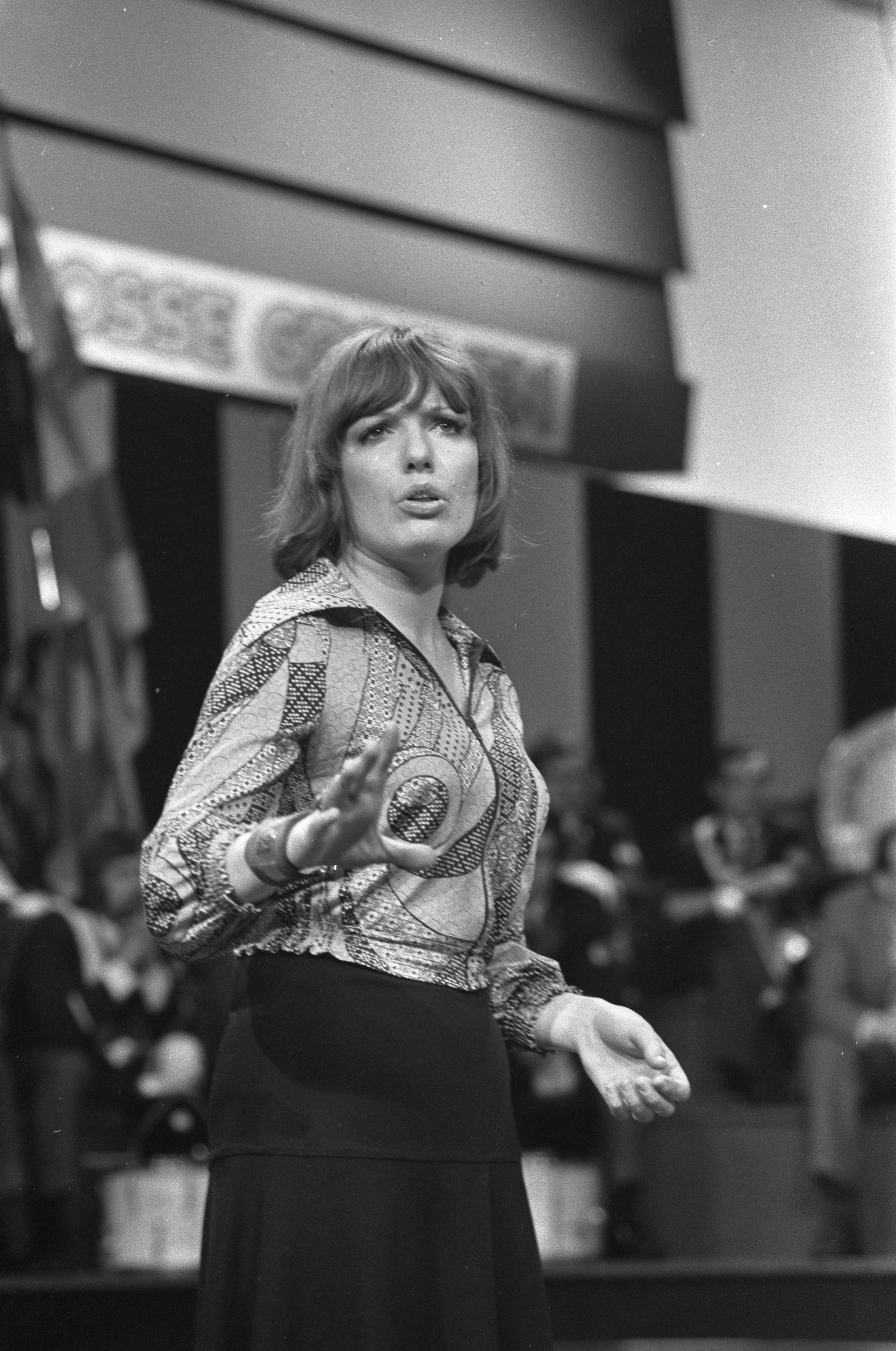 Collectie / Archief : Fotocollectie Anefo Reportage / Serie : [ onbekend ] Beschrijving : "Op losse groeven" TV, TROS, Astrid Nijgh in actie kop Annotatie : Astrid Nijgh was de echtgenote van liedjesschrijver Lennaert Nijgh Datum : 17 april 1974 Trefwoorden : muziek, scenes Persoonsnaam : Nijgh-de Backer, Astrid Instellingsnaam : TROS Fotograaf : Punt, […] / Anefo Auteursrechthebbende : Nationaal Archief Materiaalsoort : Negatief (zwart/wit) Nummer archiefinventaris : bekijk toegang 2.24.01.05 Bestanddeelnummer : 927-1307